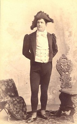 Horváth Zoltán (1860-1930) kb. 35 éves korában ismeretlen szerepben